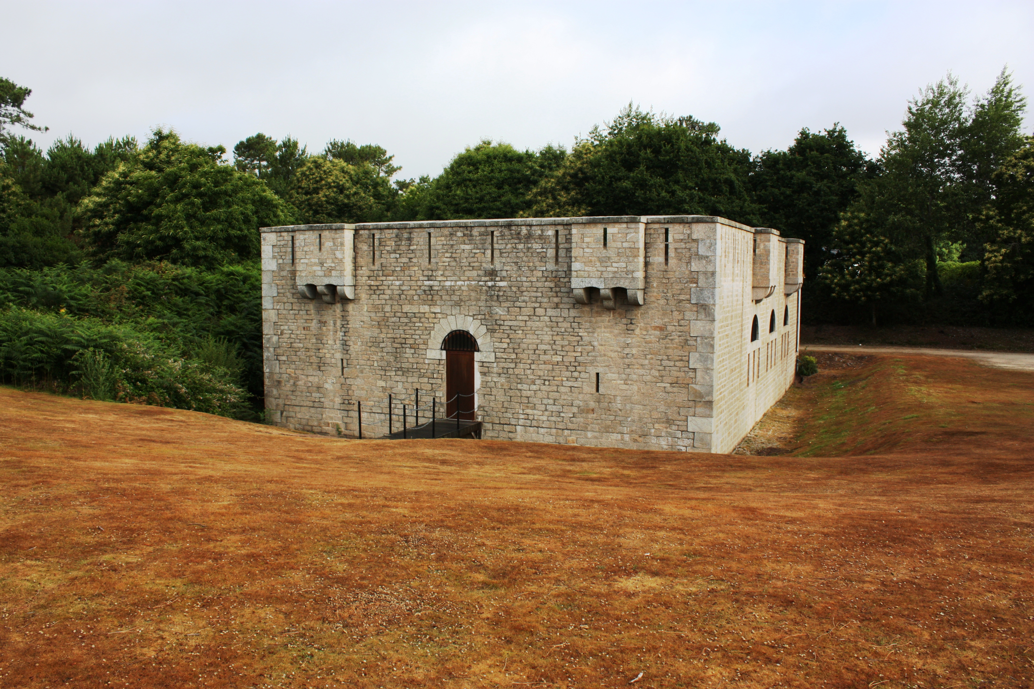 Fort de Combrit (juillet 2010)